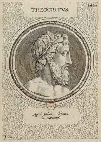 Titre : Illustrium imagines ex antiquis marmoribus, nomismatibus, et gemmis expressae : quae existant Romae, maior pars apud Fulvium Ursinum. Editio altera aliquot imaginibus, et I. Fabri ad singulas commentario auctior atque illustrior ; Appendix ad imagines illustrium ex Fulvii Ursini Bibliotheca... / Theodorus Galleus delineabat Auteur : Galle, Théodor (1571-1633). Illustrateur Éditeur : Antverpiae Date d'édition : 1606 Sujet : Hommes et femmes célèbres (AntiquitéPortraits Type : image fixe Langue : Latin Format : 8 p., 341 f. de pl. : ill., frontisp., portr. gr. ; in-4 Format : image/jpeg Droits : domaine public Identifiant : ark:/12148/btv1b84521435 Source : Bibliothèque nationale de France, département Estampes et photographie, 4-NE-39 Relation : Provenance : bnf.fr Date de mise en ligne : 12/03/2013